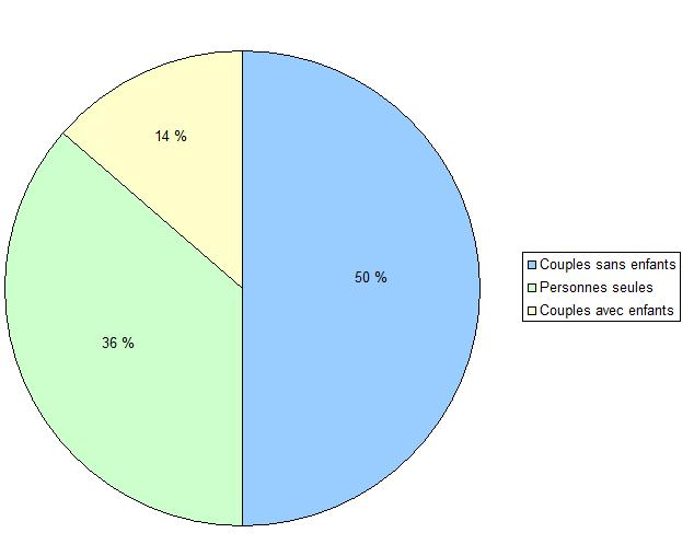 Composition, en 2007, des foyers, au Plessis-Dorin, département du Loir-et-Cher (France).